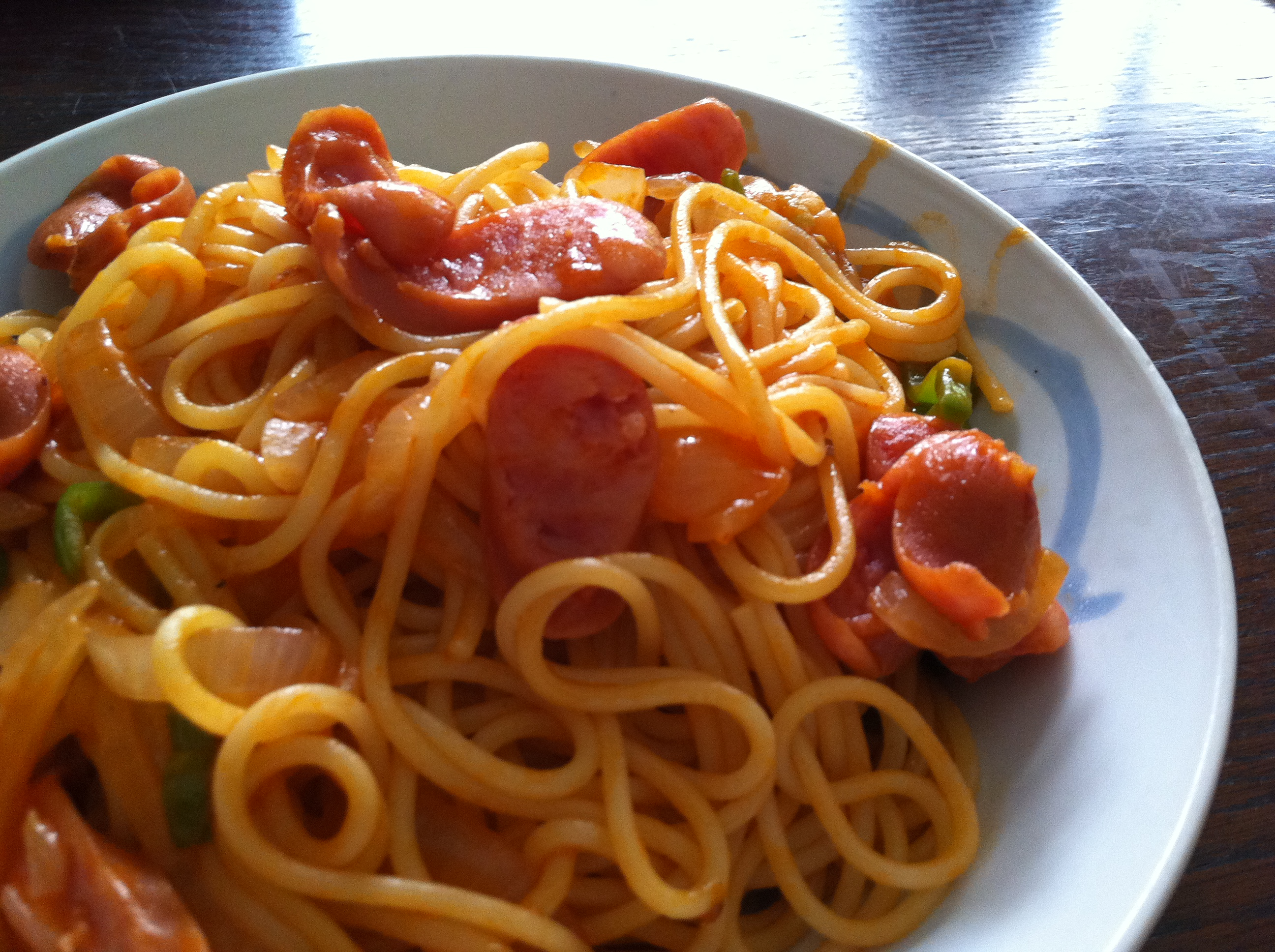 Naporitan